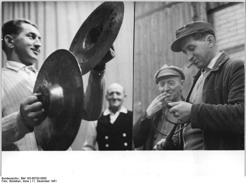 Breitenfeld, Mitglieder des Dorfensembles Zentralbild Eckleben 11.12.1961 Breitenfeld-singendes und tanzendes Dorf in der Altmark 254 Einwohner zählt das im Bezirk Magdeburg in der Nähe von Gardelegen liegende vollgenossenschaftliche Dorf Breitenfeld. Vor etwa zehn Jahren begann der Lehrer des Dorfes und heutige Ensembleleiter Wilhelm Reinhardt mit Jugendlichen altmärkische Volkslieder zu singen. Das war die Grundlage für das jetzt rund 80 Mitglieder zählende Dorfensemble-. Heute sind vom neunjährigen Schulmädchen bis zum 68jährigen Rentner, die Genossenschaftsbäuerinnen und -bauern der LPG Typ I und Typ III, die Kindergärtnerin, der stellvertretende Bürgermeister, der Schuhmachermeister, sogar Familien-Vater, Mutter und die Kinder- im Dorfensemble uns sich allwöchentlich zur Probe in der Schule einfinden. Ihre Mühe, ihr Fleiß und ihre Begeisterung wurden 1956 mit der Auszeichnung des Staatspreises für künsterlisches Volksschaffen belohnt. Augenblicklich wird an dem neuen Programm gearbeitet, das anlässlich des Volkskunstwettbewerbes und der IV. Arbeiterfestspiele im nächsten Jahr aufgeführt werden soll. UBz: Der 32jährige stellvertretende LPG-Vorsitzende der LPG Typ III, Günter Verter, und Ernst Paasche (im Hintergrund) stehen auf der Bühne und bei der täglichen Arbeit ihren Mann-.